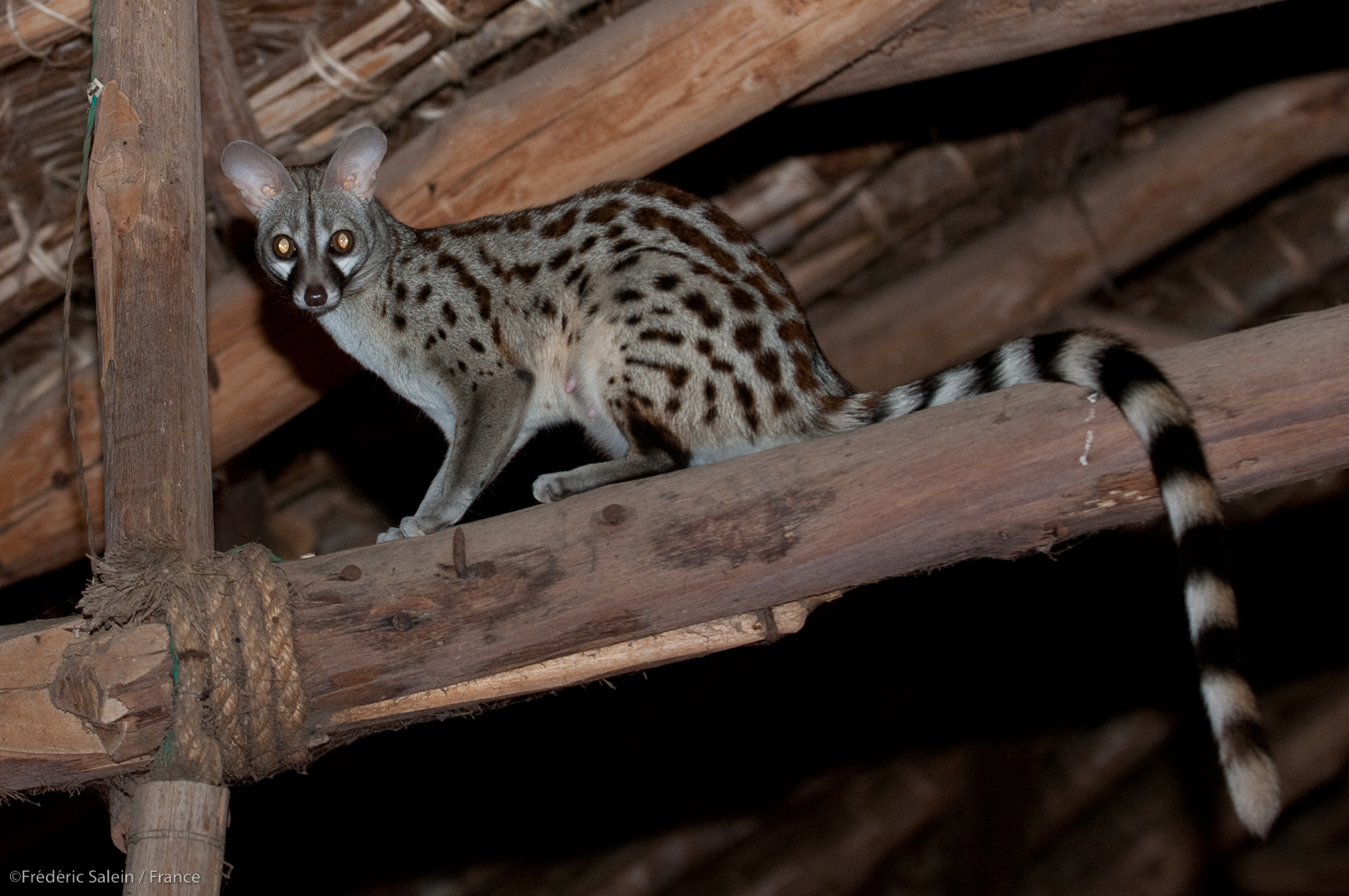 Genette commune, salle de restaurant, Satao Camp A female common genet in the dining room, Satao Camp